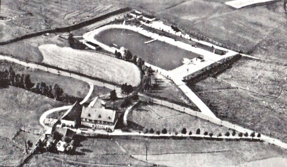 Die Rote Mühle und dahinter das Freibad von Schönheide im Erzgebirge. Blickrichtung etwa Nord-West.